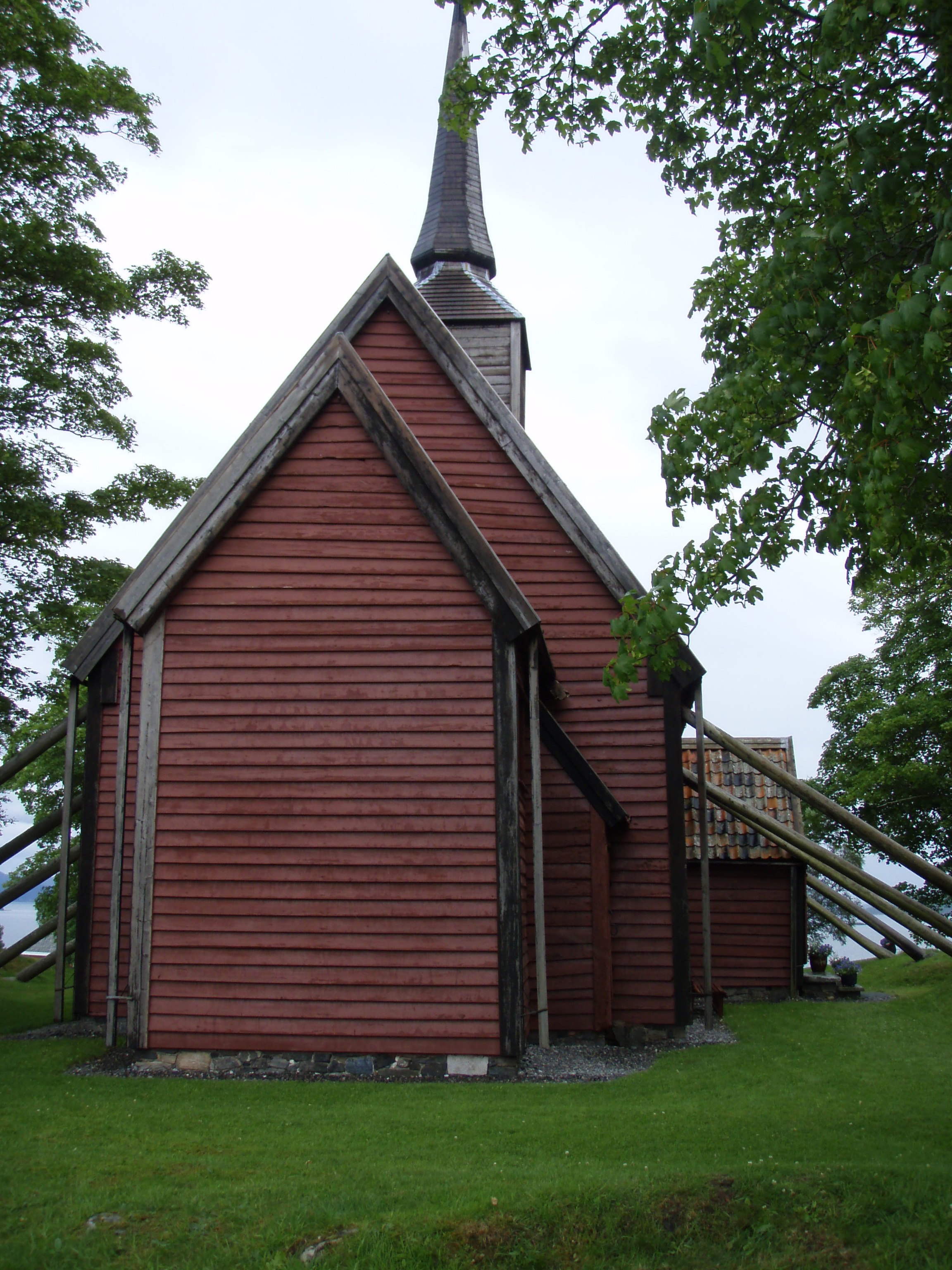 Stavechurch, Kvernes gamle kirke på Averøy, Møre og Romsdal